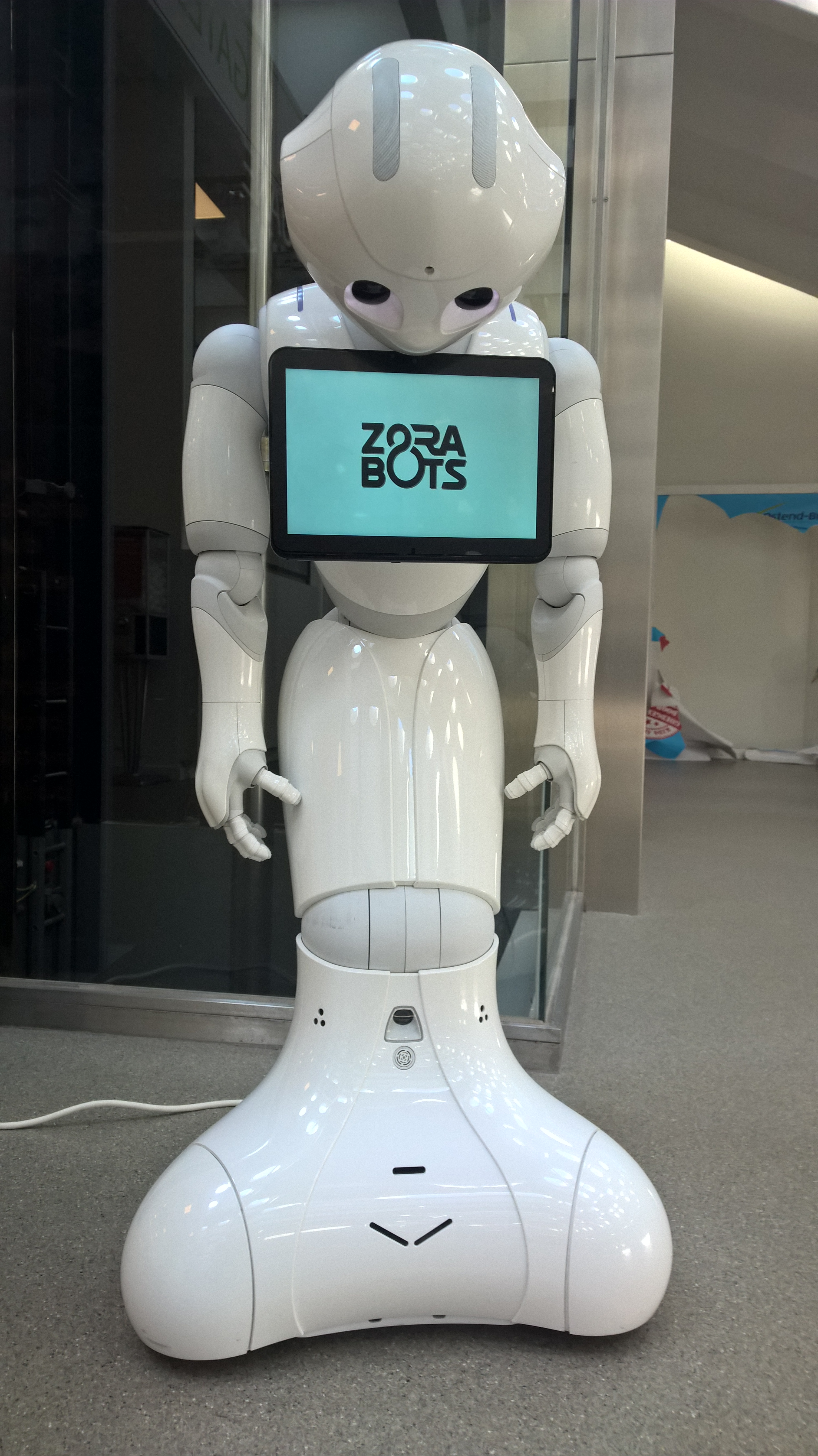 Roboto Zora eble klopodos paroli en Esperanto estontece..